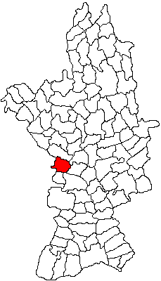 Categorie:Hărţi ale judeţului Olt